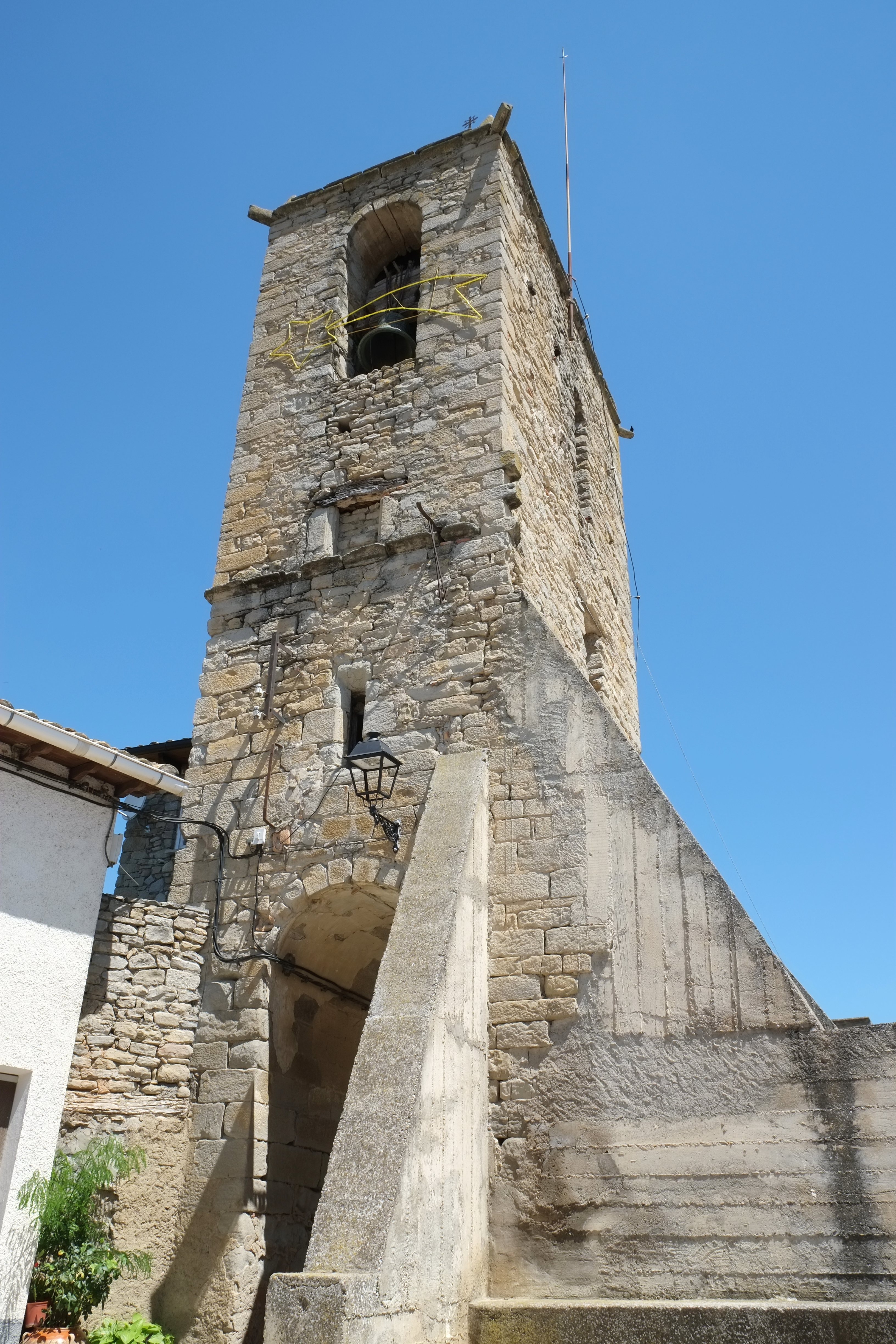 Turm in Torre de Ésera in Spanien